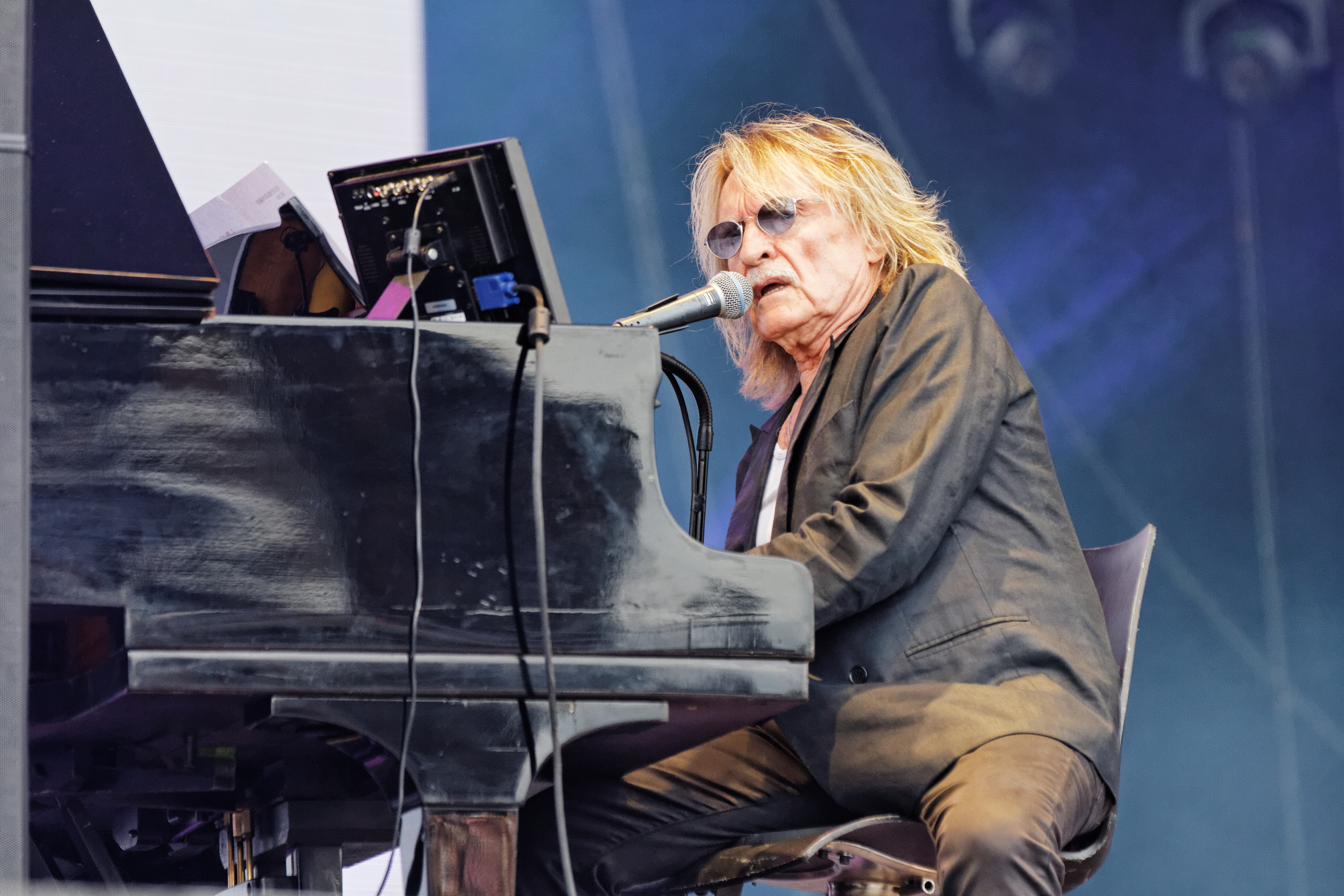 Christophe en concert sur la scène Glenmor lors du festival des Vieilles Charrues 2014.